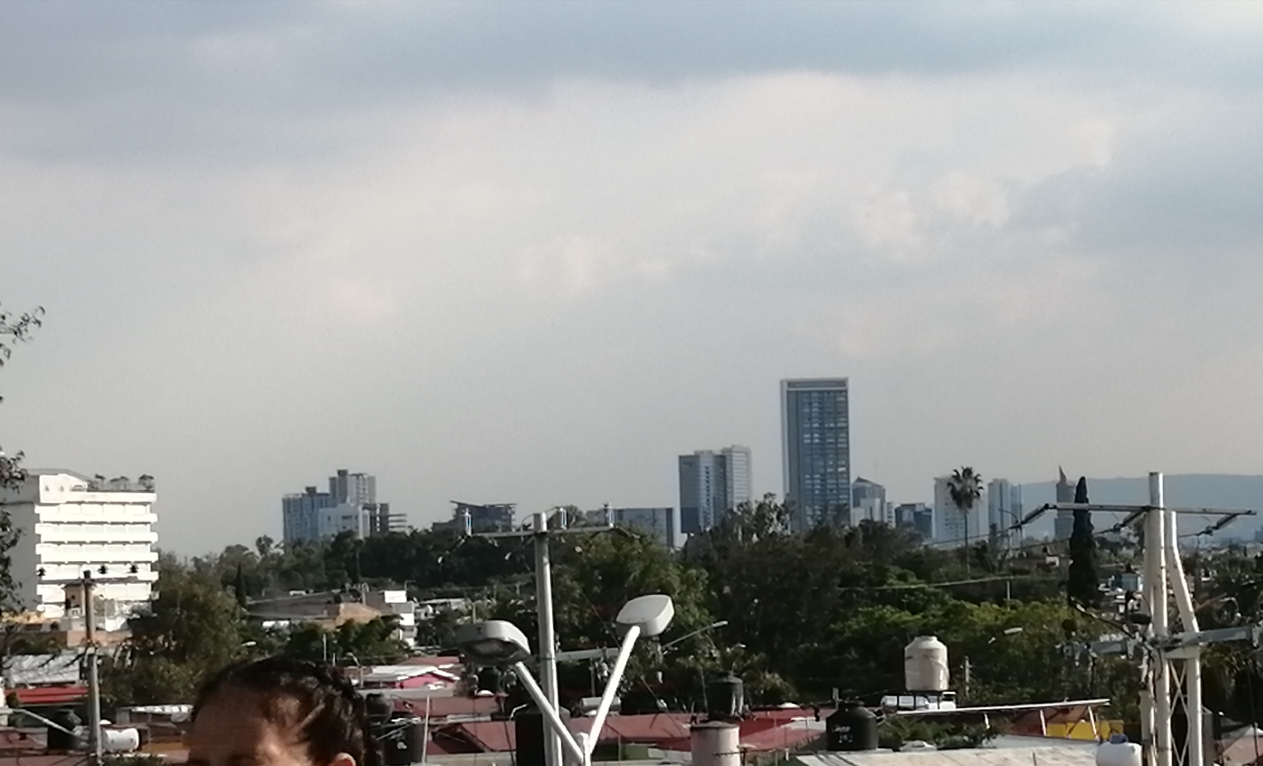 ciudad de Zapopan